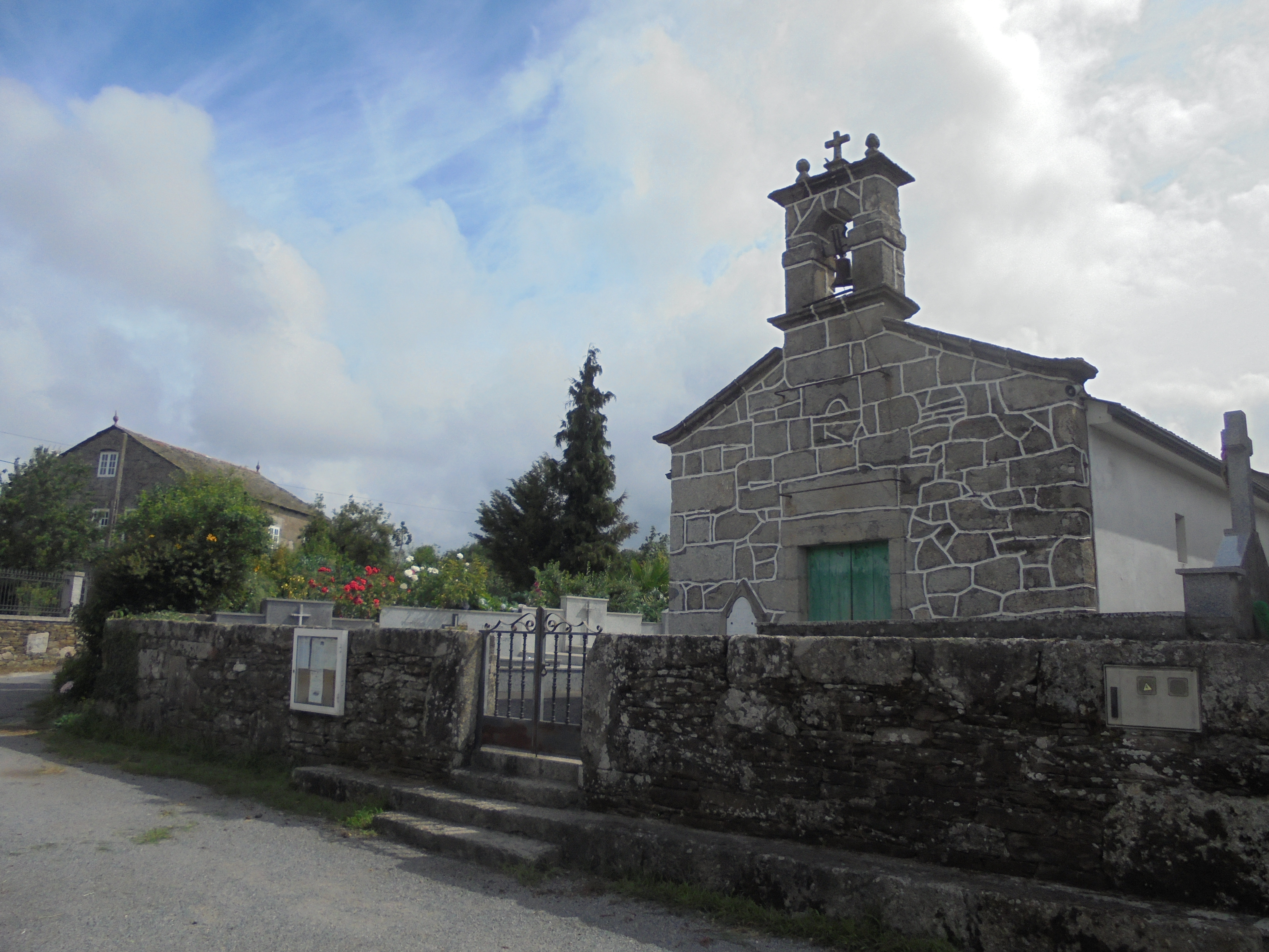 Igrexa de Sta María de Manán ( O Corgo)